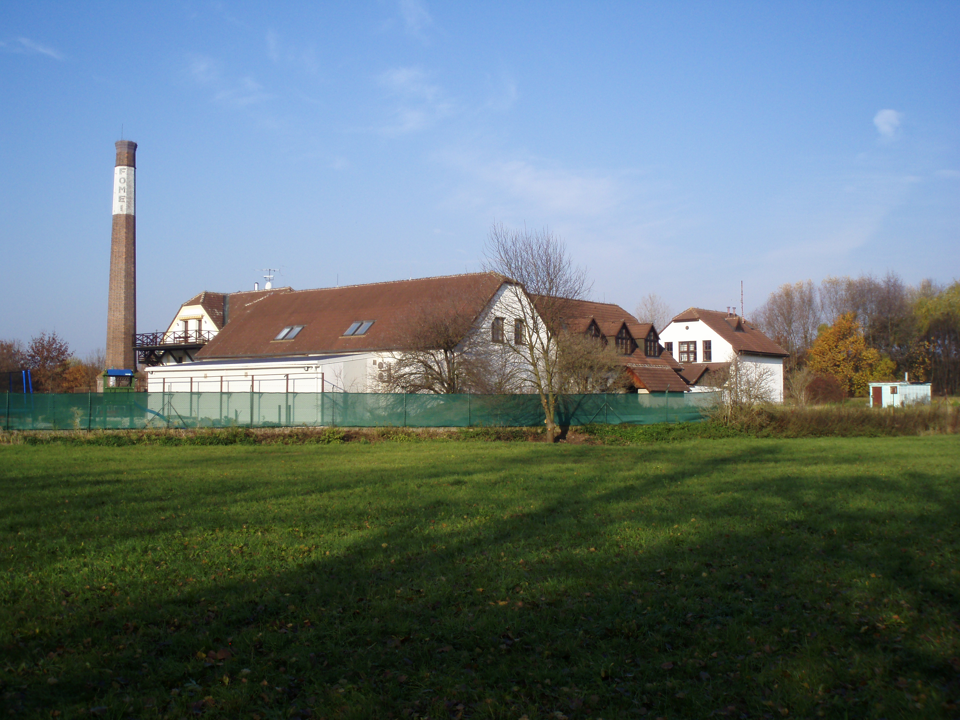 Bývalý Temešvárský mlýn